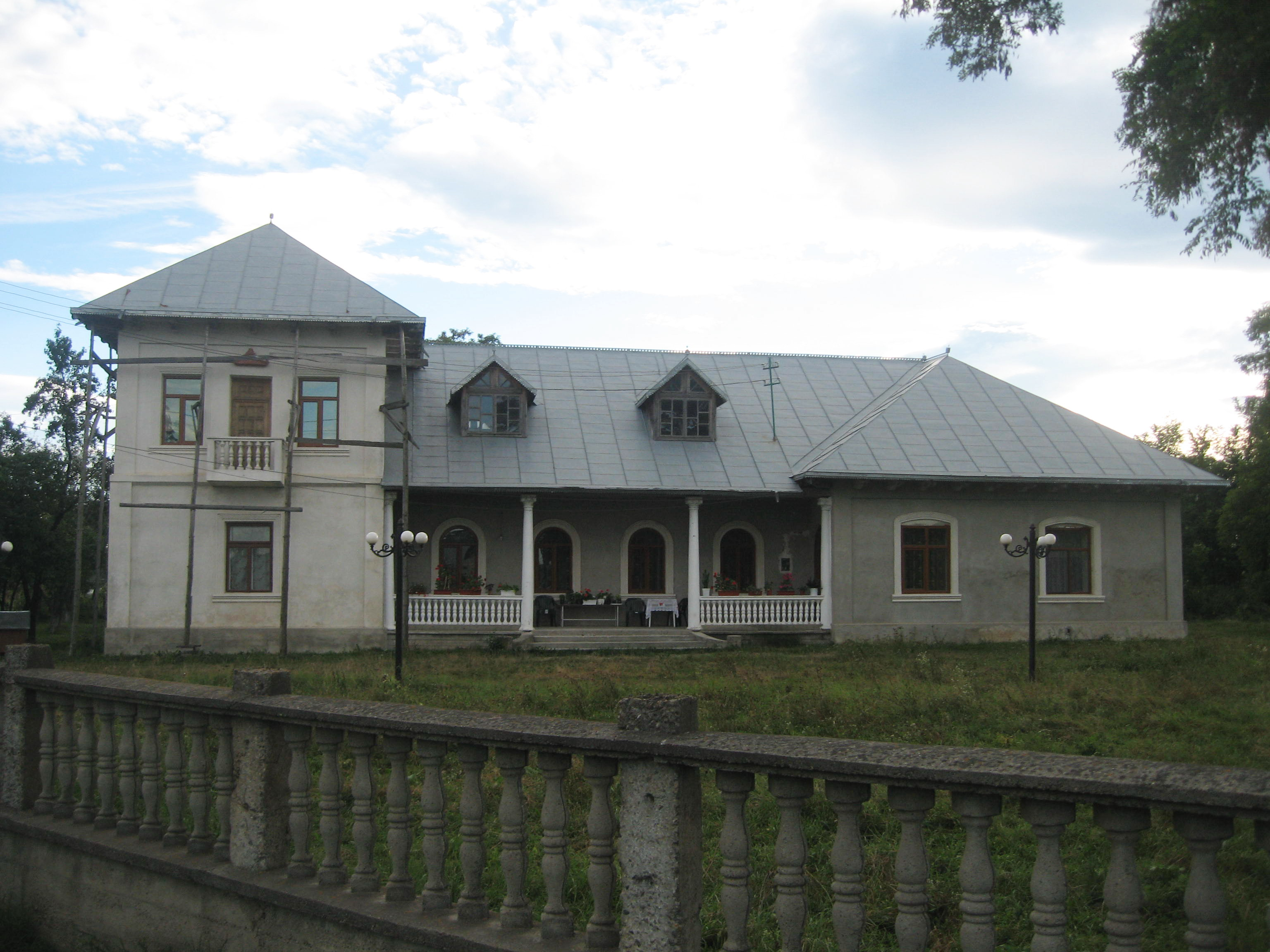 Conacul din Zvoriștea